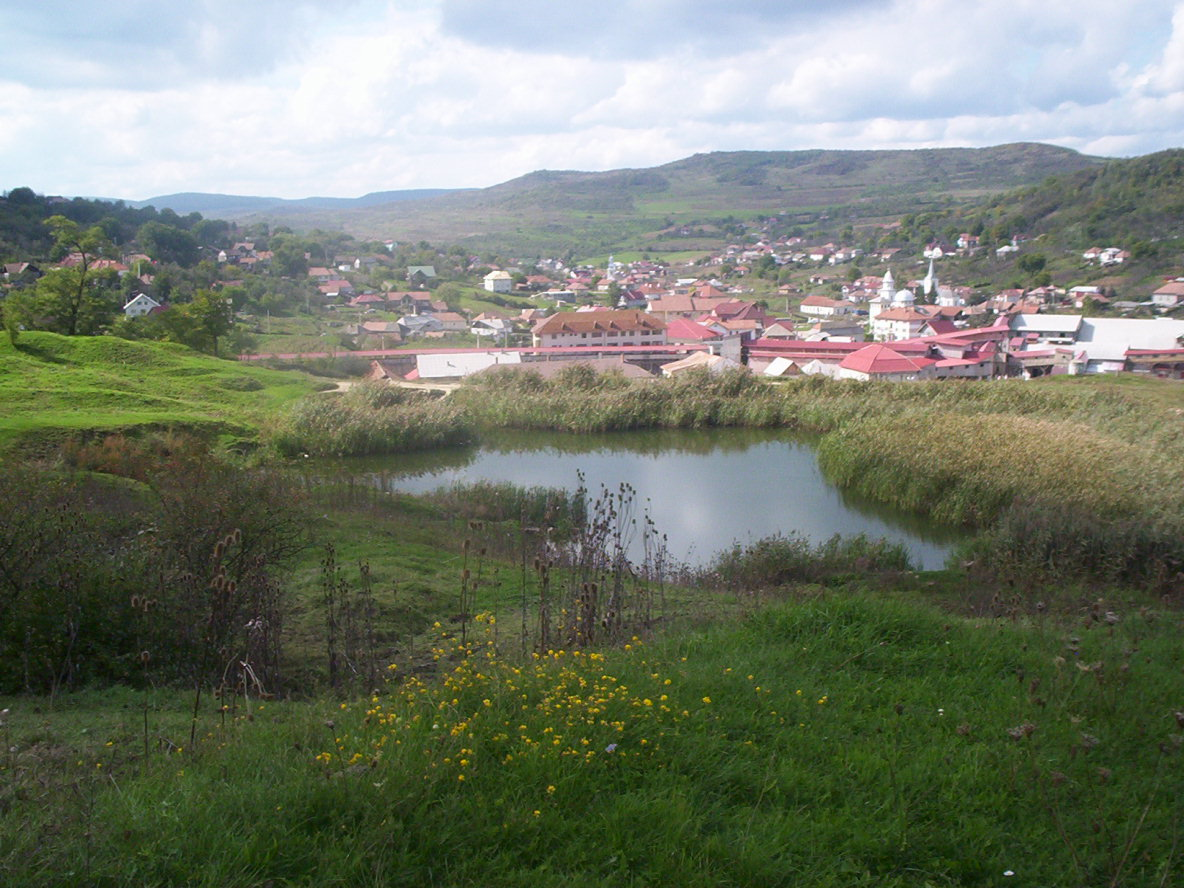 Ocna Dejului: vedere de pe deal. În imagine lacul cu apă sărată şi localitatea Ocna Dejului în vara anului 2007.